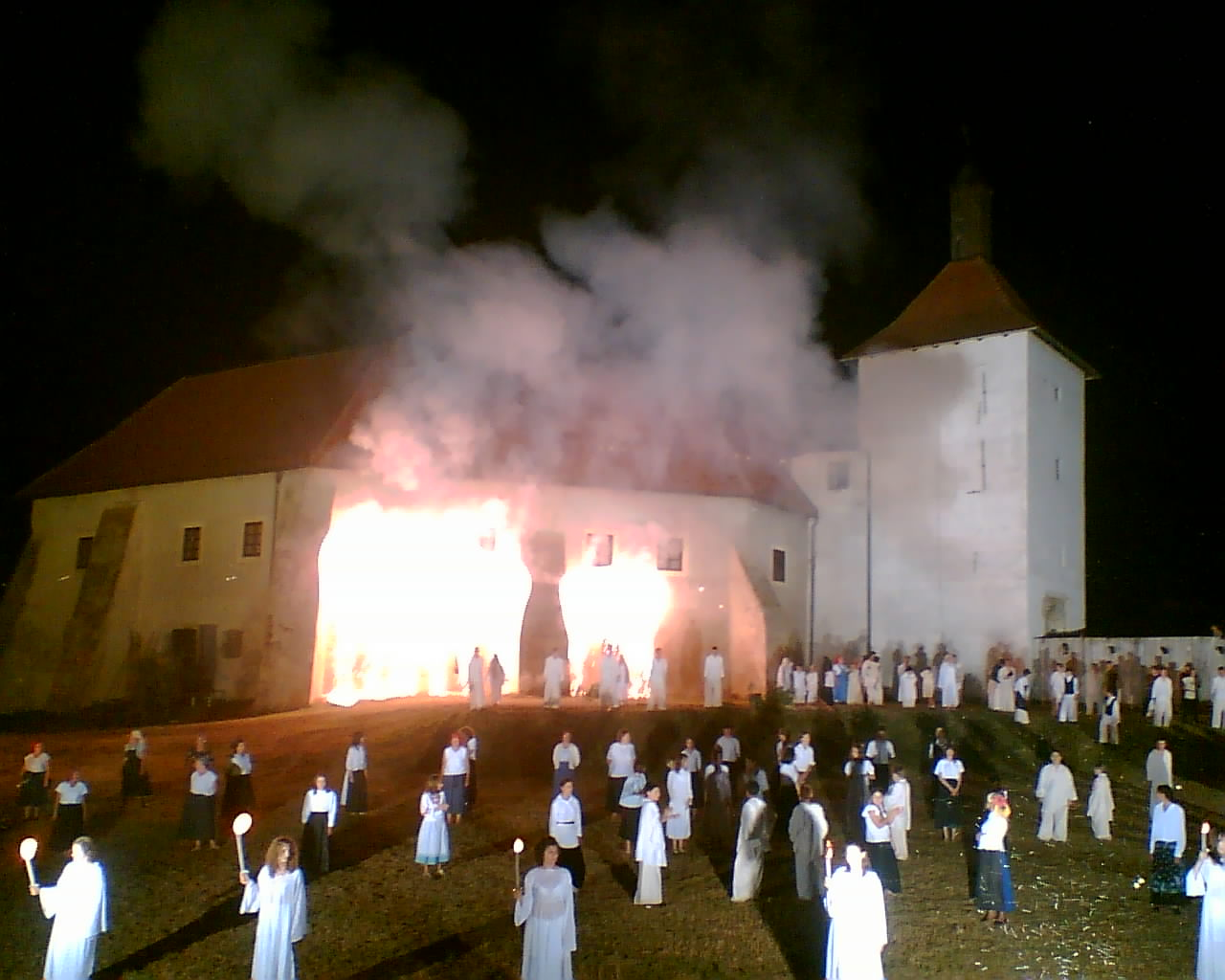 Scenska predstava koja se događa svake godine zadnji vikend mjeseca lipnja u Đurđevcu (Hrvatska). Govori o pobjedi nad Turcima.